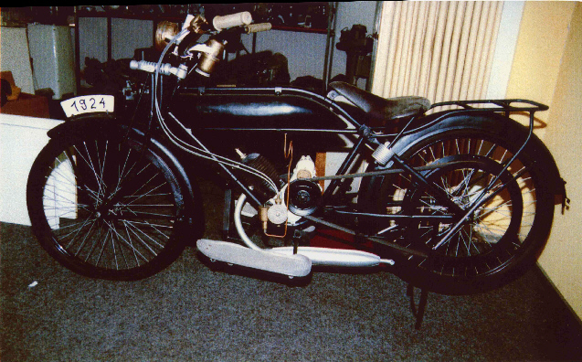 Motorrad mit ILO-Motor Baujahr 1924 (Typ des Motorrades unbekannt).